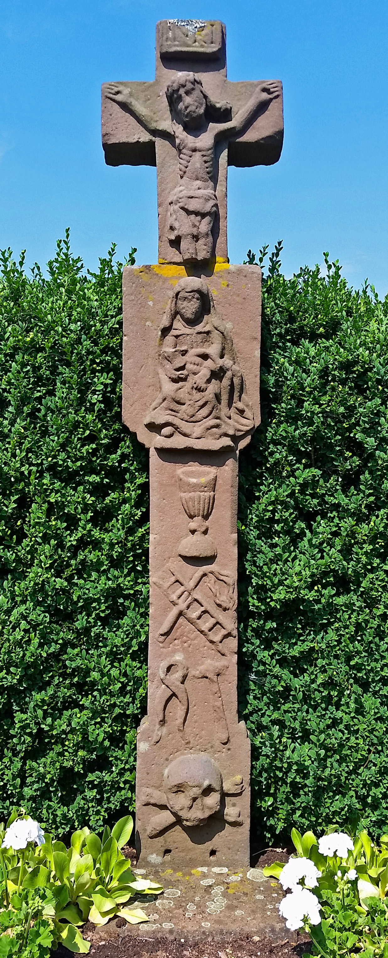 Wegkreuz in Weidingen, oberer Teil von einem anderen Wegkreuz aufgesetzt)